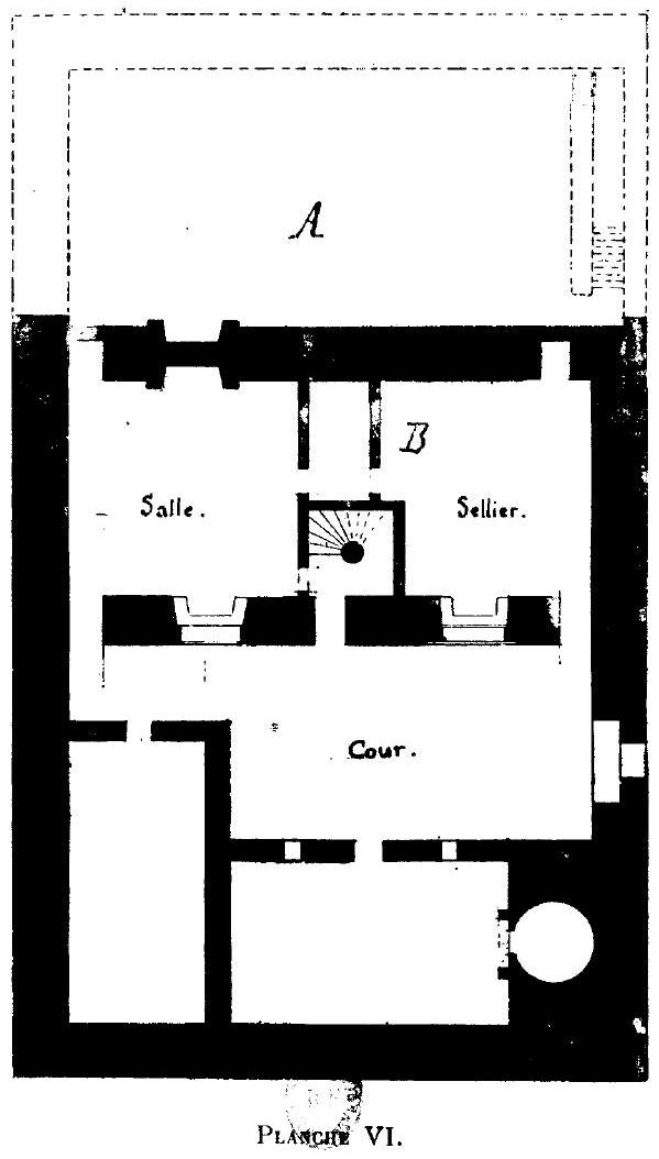 Le Donjon de Courmenant, ses origines, ses seigneurs et possesseurs, son musée